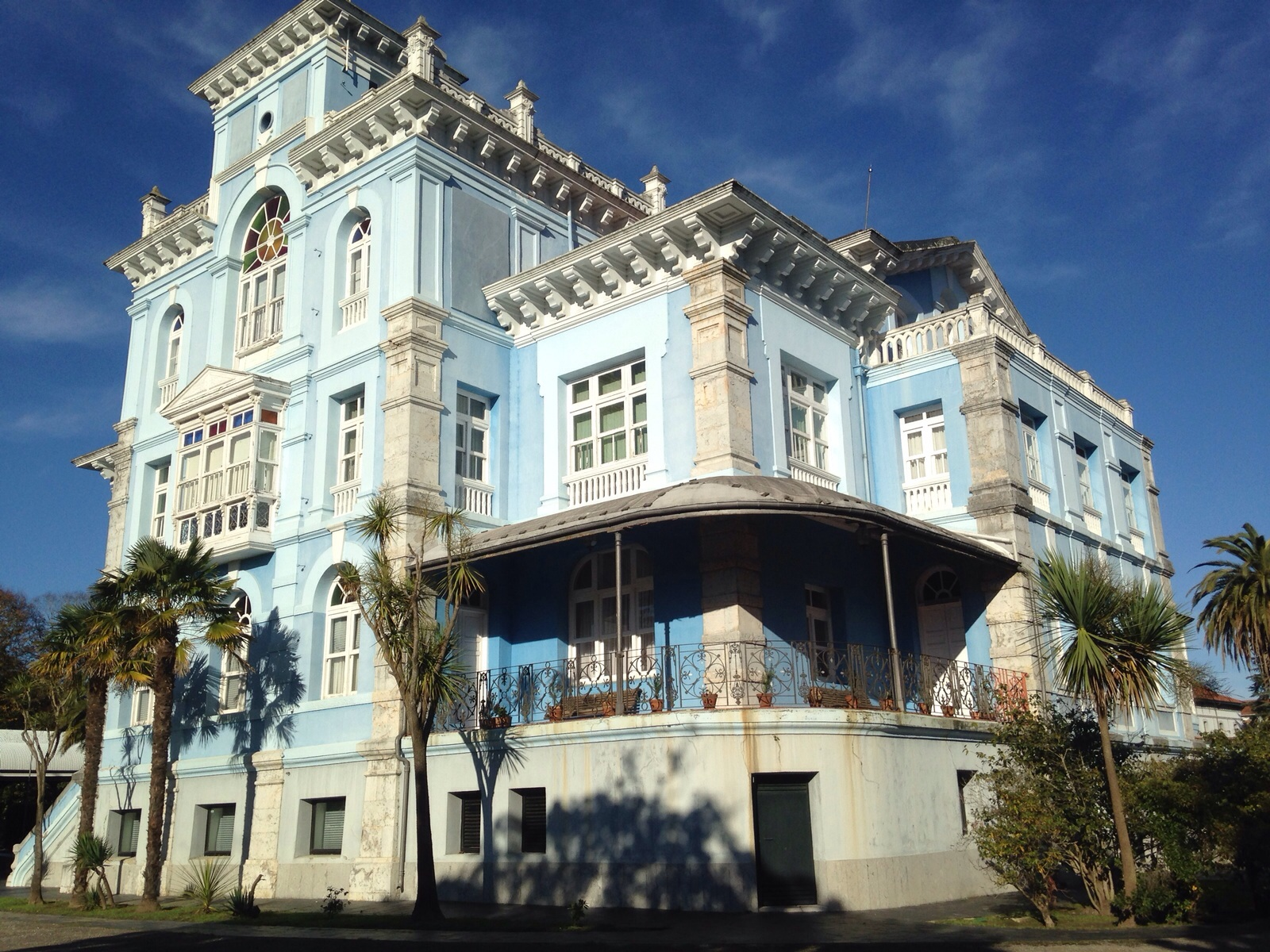 Fachada posterior del archivo de indianos de colombres